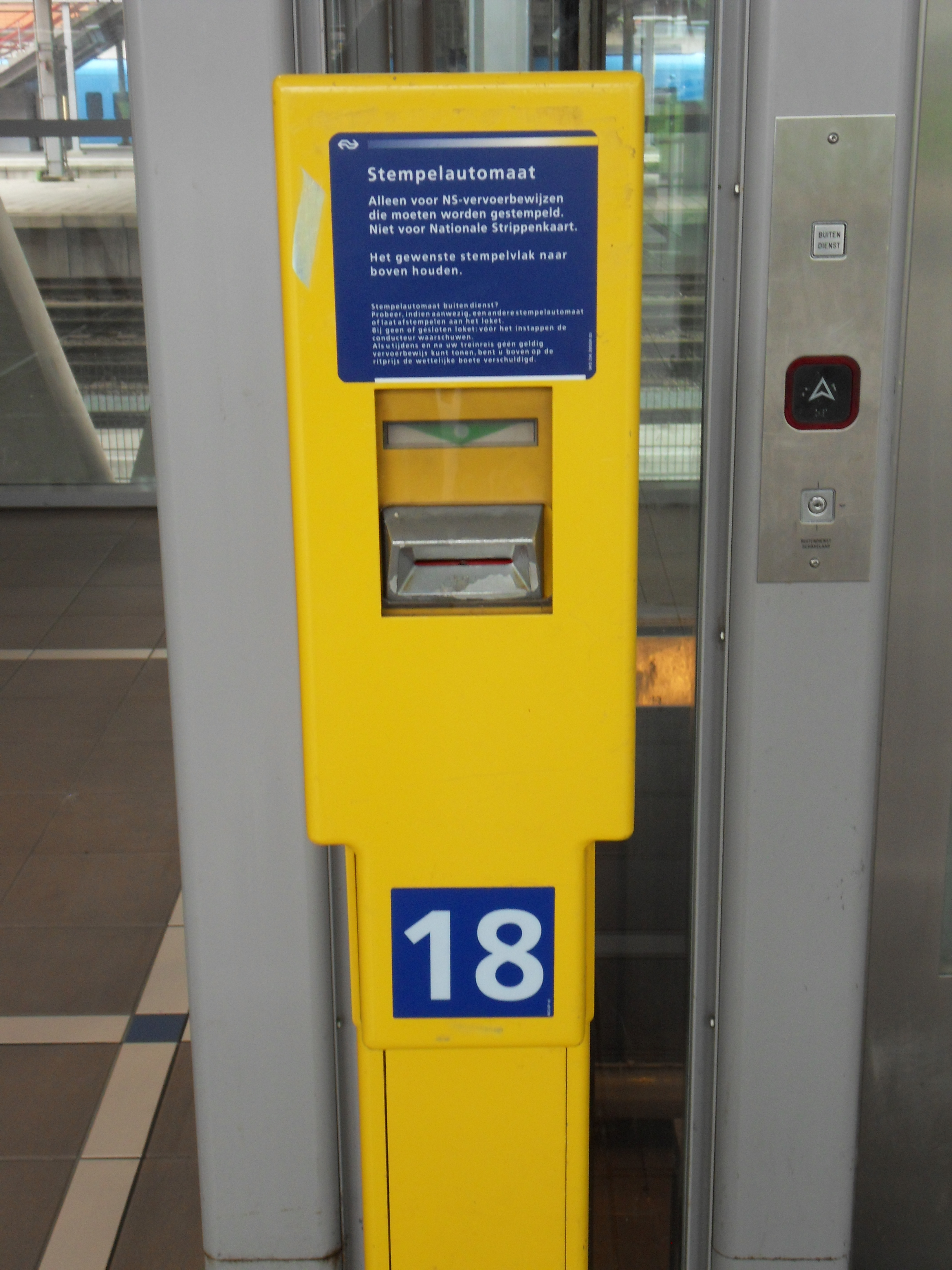 Gele stempelautomaat van de NS.